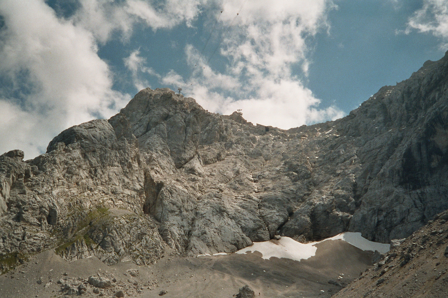 Selbst fotografiert im August 2005. Bei genauer Betrachtung ist oben in der Mitte des Felsmassivs die Öffnung der verwaisten Gipfelstation der 1991 stillgelegten alten Tiroler Zugspitzbahn als kleines schwarzes Viereck zu sehen. Die Bahn wurde durch einen Neubau ersetzt und fährt heute direkt bis zur Gipfelplattform. Man unterschätze die Größenverhältnisse auf dem Bild nicht: die Wandhöhe von der Geröllgrenze bis zum Gipfel beträgt rund 600 Meter!